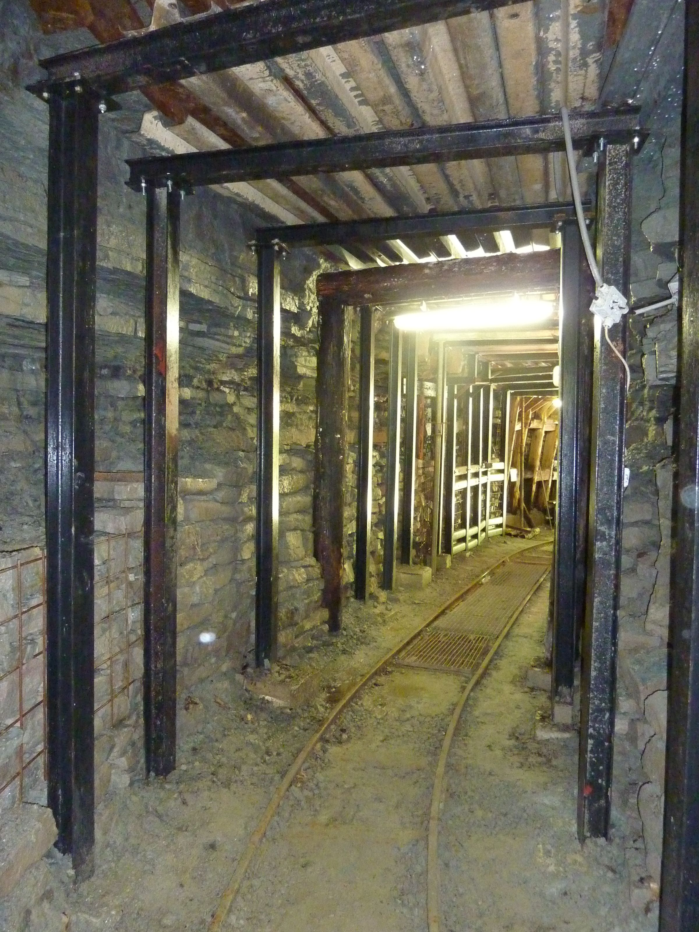 Wetzsteinstollen, Zustand 2013